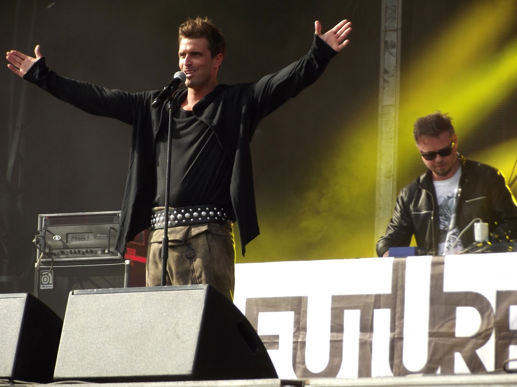 Zespół Future Folk, zdjęcie zrobione podczas drugiego dnia Life Festivalu 2013 w Oświęcimiu.